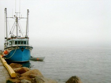 Bateau de pêcheur, à Blanc-Sablon, au Québec